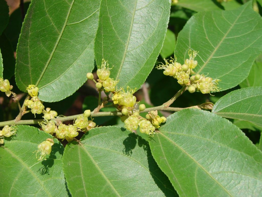 Guazuma ulmifolia Lam. (Sin. het. Guazuma tomentosa Kunth) - MALVACEAE - APA do Planalto Central - Brasília - Distrito Federal - Brasil.